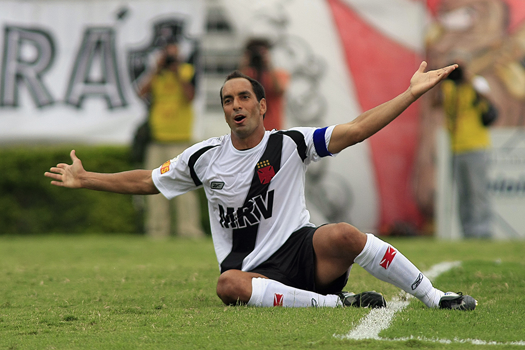 Edmundo Alves de Souza Neto, mais conhecido como Edmundo o Animal, ex-futebolista brasileiro.